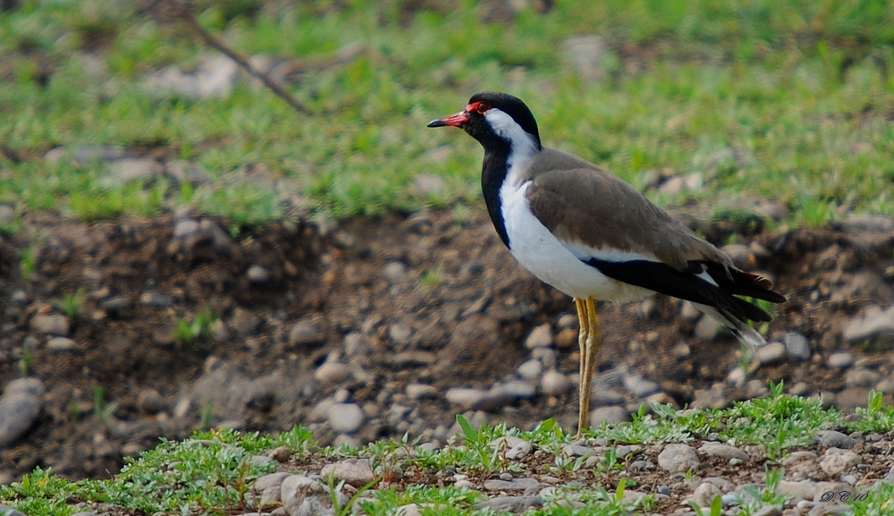 Min bi xwe kişandiye(own work)